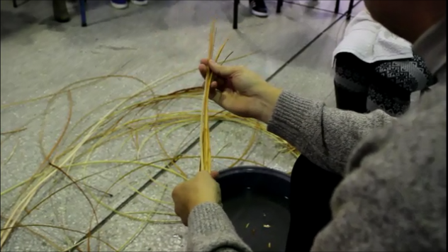 Esta Foto fue tomada en una clase de cestería que se dio en la escuela ubicada en Villa Domínico. El trabajo está hecho con mimbres que se recolectó en la costa de Villa Domínico (Avellaneda), La cestería es una de las artes más antiguas,es practicada a partir de tiras o fibras de origen vegetal, Los indígenas diferenciaban mas de 700 nombres de distintas especies y plantas. En la costa de Villa Domínico la cestería ha sido una importante actividad económica produciendo canastos,cajones y cubriendo artesanal mente Las damajuanas para que no se rompan.